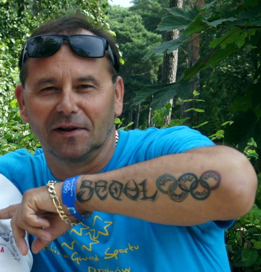 Marek Łbik